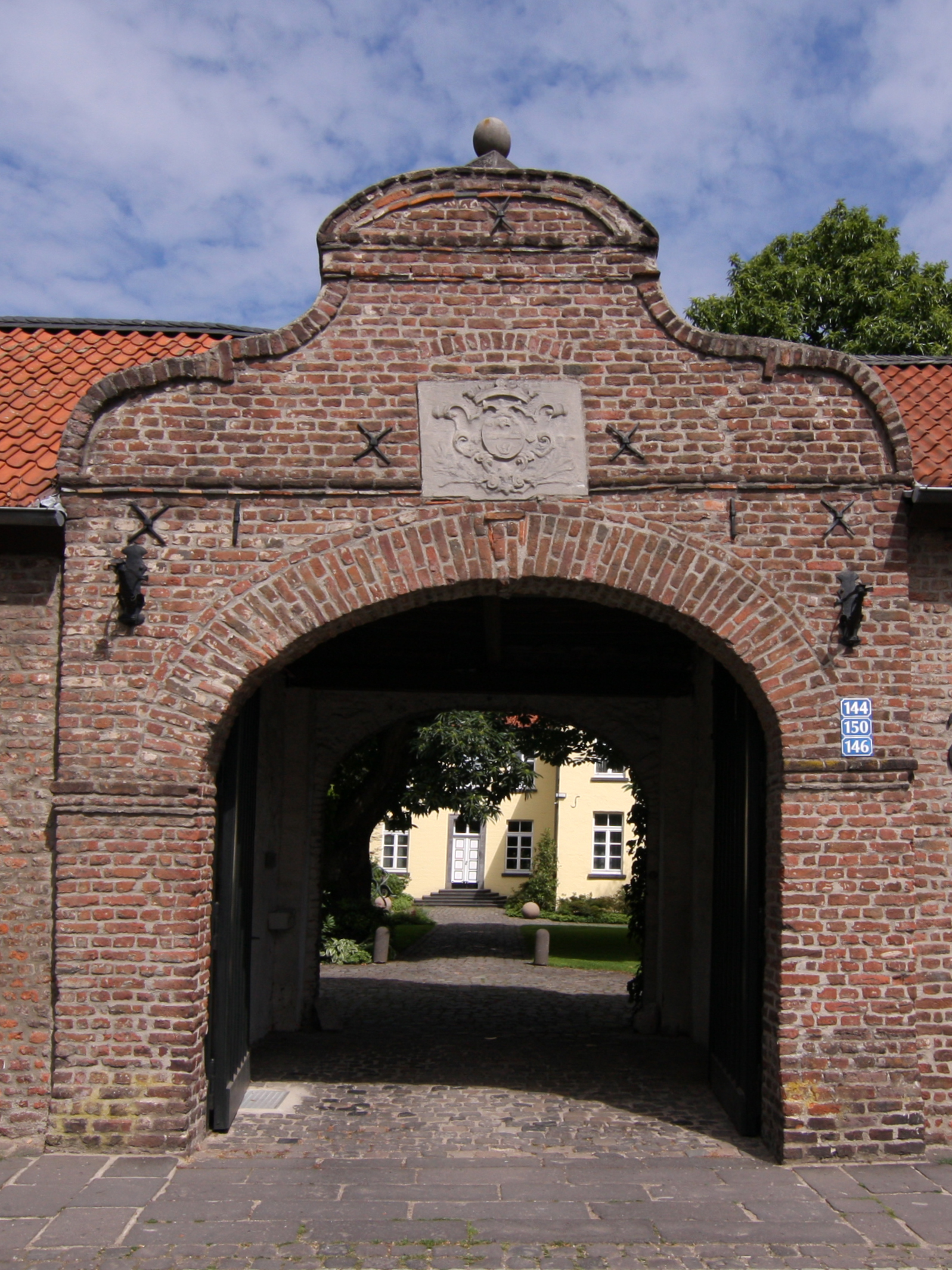 Tor des Bakenhof Tor des Bakenhofs